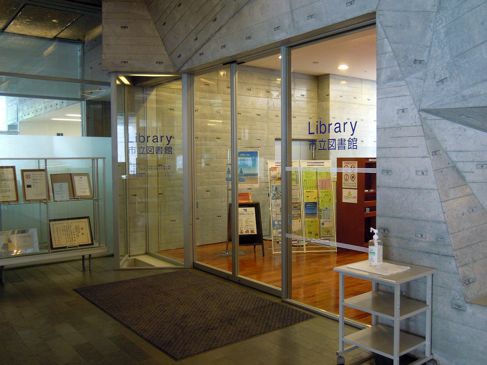 岩手県大船渡市の大船渡市民文化会館・市立図書館（リアスホール）内にある大船渡市立図書館の入口